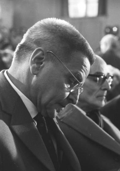 Zentralbild/Sturm 31.5.1962 Deutsche Akademie der Künste erklärt sich zur Sozialistischen Akademie - Dr. h.c. Willi Bredel neuer Präsident Die Deutsche Akademie der Künste zu Berlin erklärte sich am 30.5.1962 in einer ordentlichen Plenartagung zur Sozialistischen Akademie. Die Mitglieder wählten den neuen Präsidenten und die Vizepräsidenten der Akademie und bestätigten die ständigen Sekretäre der Sektionen. Zum Präsidenten wurde einstimmig Dr. h.c. Willi Bredel gewählt. Vizepräsidenten sind Prof. Dr. Walter Felsenstein, Prof. Ottmar Gerster, Prof. Wolfgang Langhoff und Prof. Otto Nagel. Die Mitglieder der Akademie nahmen einstimmig ein neues Statut an. Es löst das in der Zeit des antifaschistischen demokratischen Aufbaus entstandene und 1945 von der Regierung der DDR bestätigte Statut ab und legt die Aufgaben einer Sozialistischen Akademie fest. UBz. Während der Plenartagung. 93752/3N